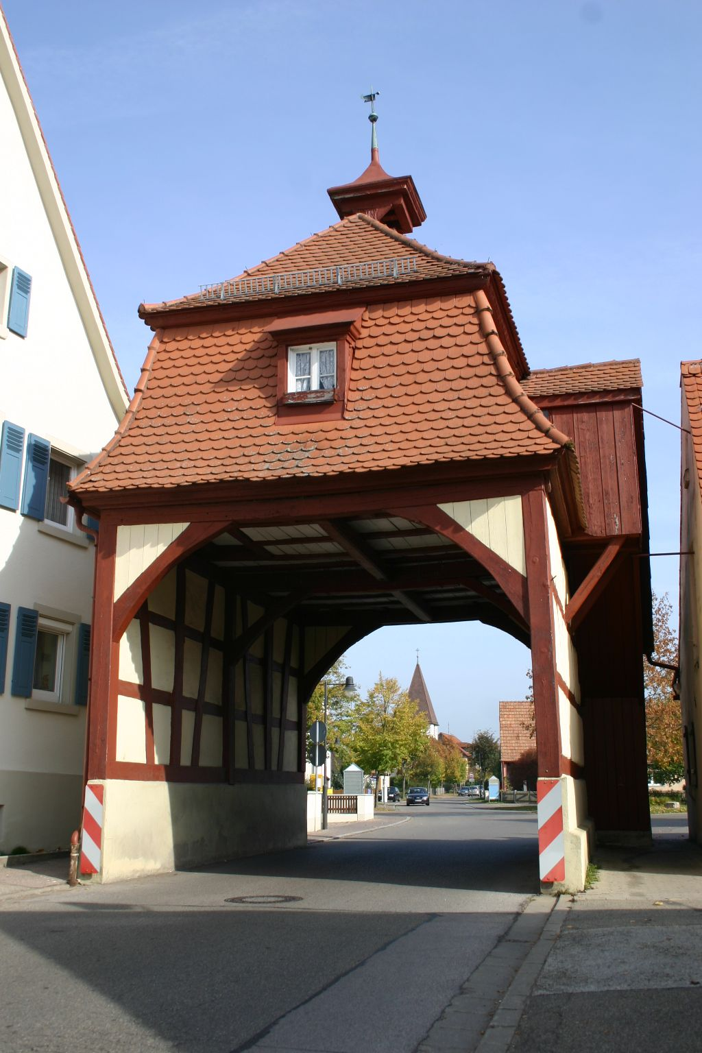 Torturm Altenmuhr